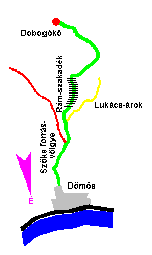 Vázlat a Rám-szakadékról és a Lukács-árkáról